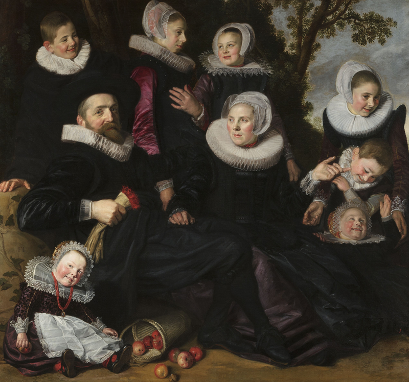 Frans Hals, La Famille Van Campen dans un paysage (fragment), vers 1623-1625. Huile sur toile. – 151 × 163,6 cm, Toledo Museum of Art, Toledo (Ohio), inv. 2011.80